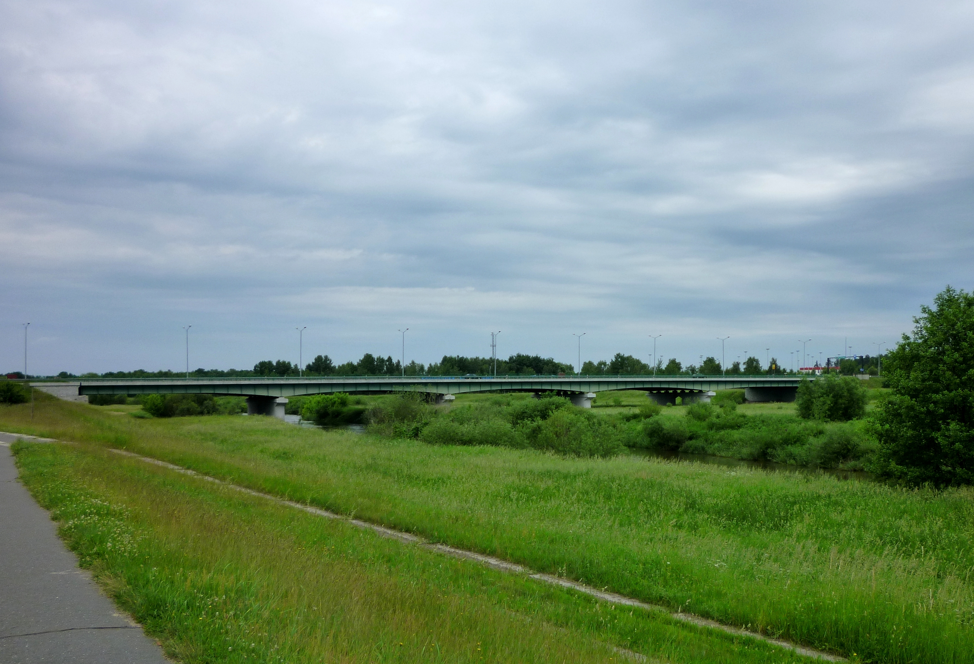 Neiße-Brücke der A 15 (Deutschland) / A 18 (Polen) / E 36 bei Klein Bademeusel (Ortsteil von Forst (Lausitz)) und Olszyna (Ortsteil von Trzebiel)